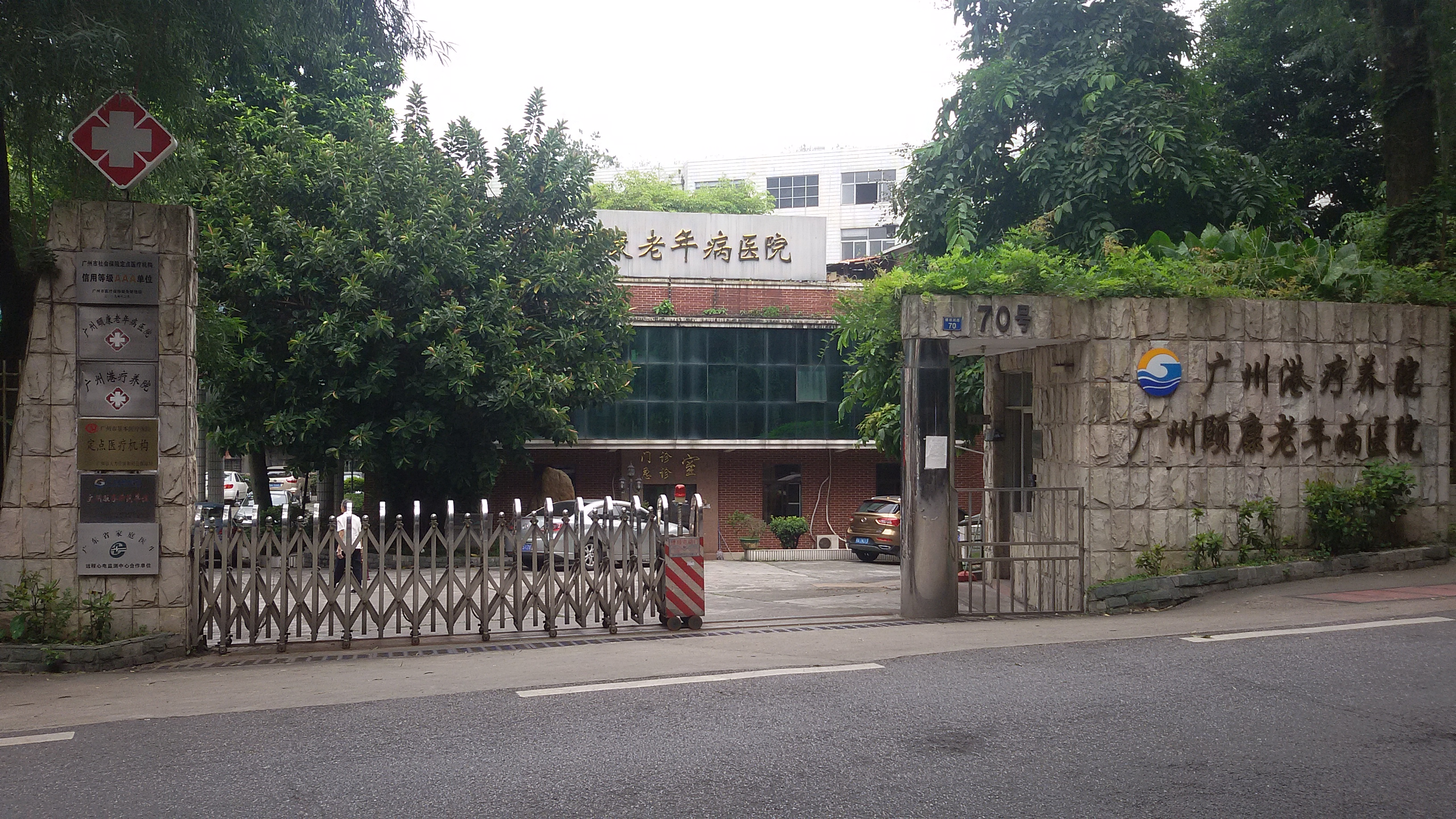 粵語: 广州港疗养院